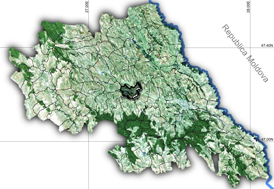 Podu Iloaiei jud Iasi.